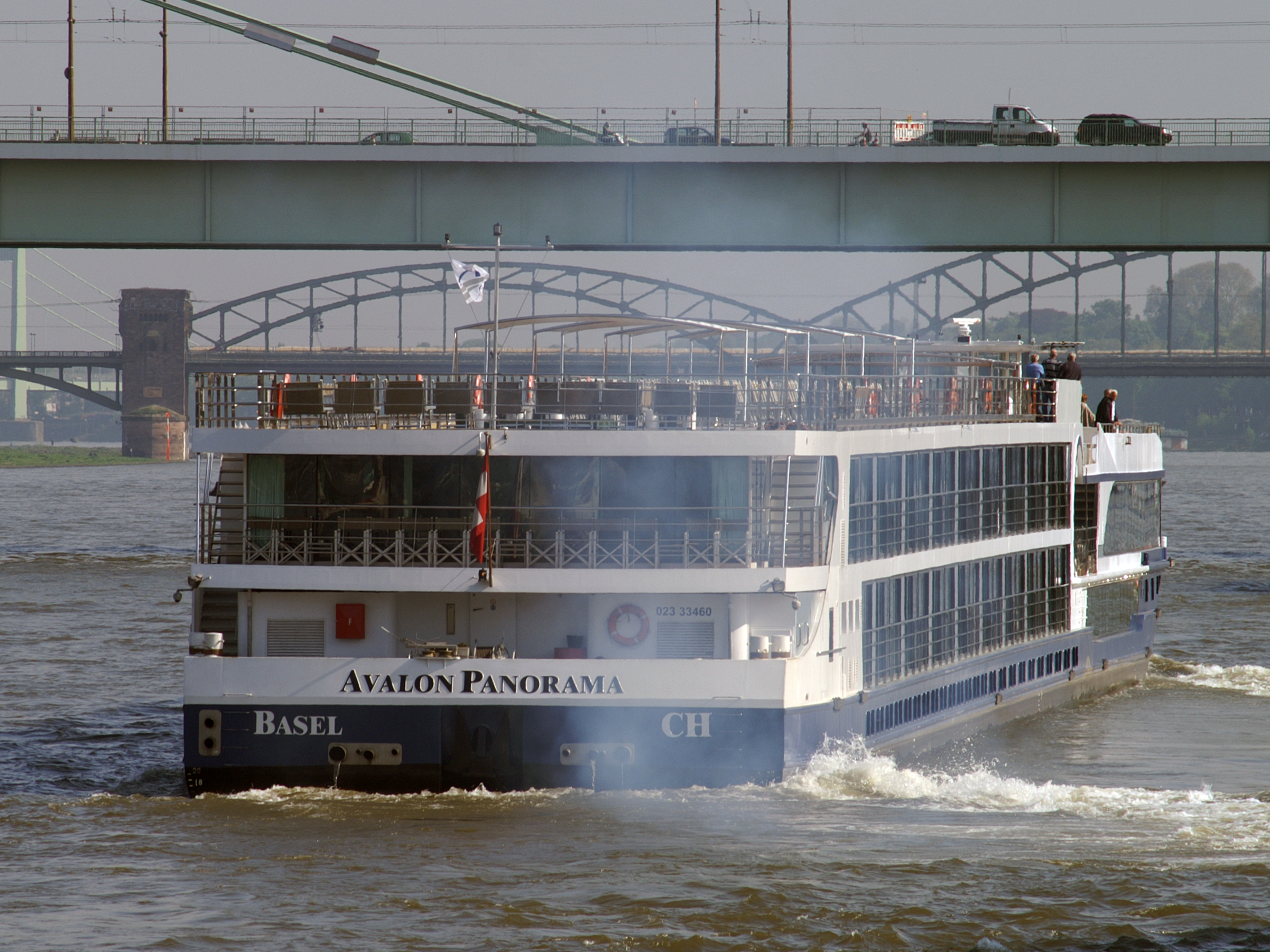 Flusskreuzfahrtschiff Avalon Panorama auf Fahrt in Köln.